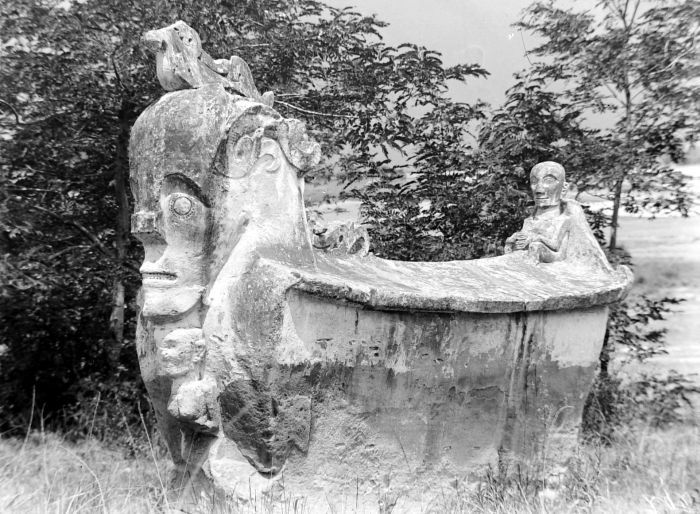 Negatief. De Toba-Bataks kenden stenen lijkkisten met stenen deksel (sarcofaag). De op de foto afgebeelde kist, die van 1840 dateert, is getooid met de kop van een singa. Deze term en het dier dat ermee wordt aangeduid verraadt invloed vanuit India. Singa betekent leeuw in het Sanskriet en is bijvoorbeeld terug te vinden in de naam Singapore (Singapura, leeuwenstad). Ook is het woord terug te vinden in de titel van de legendarische 'priestervorst' van de Bataks, Si Singamangaraja. Leeuwen kwamen echter niet voor op Sumatra of op Singapore, zodat we wellicht eerder aan een tijger moeten denken. (P. Boomgaard, 2001). Sarcofaag met schedels, Hoeta Naibabo, Samosir, Tapanoeli, Noord-Sumatra.